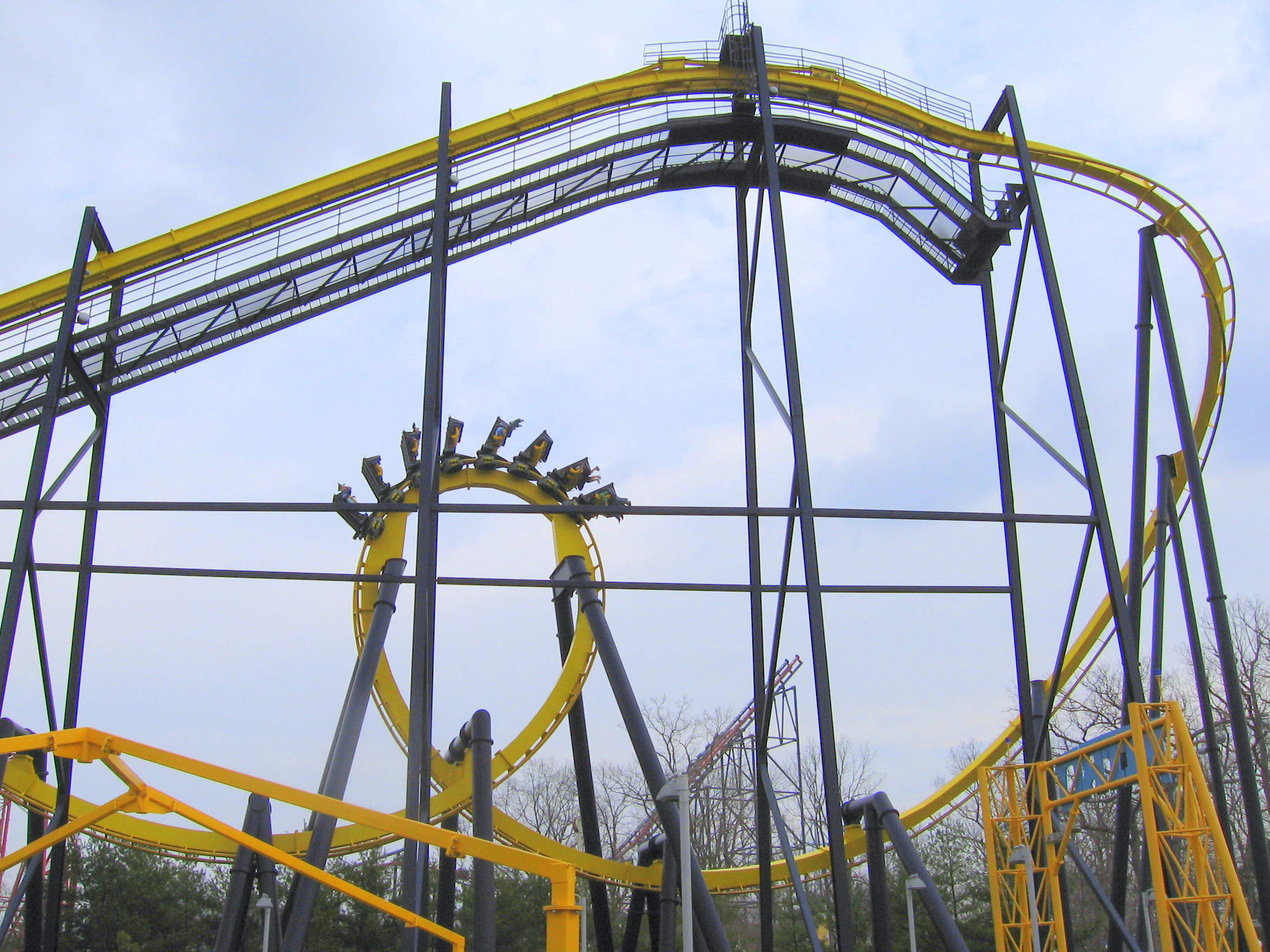 Took it myself. Dusso Janladde 05:07, 2 April 2006 (UTC)